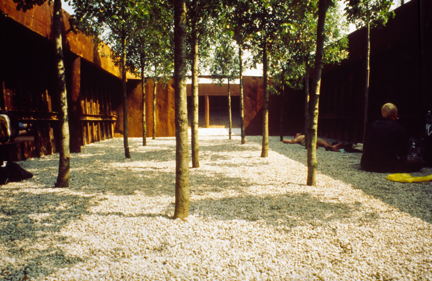 Casagrande & Rintala: 60 Minute Man, Venice Biennale 2000